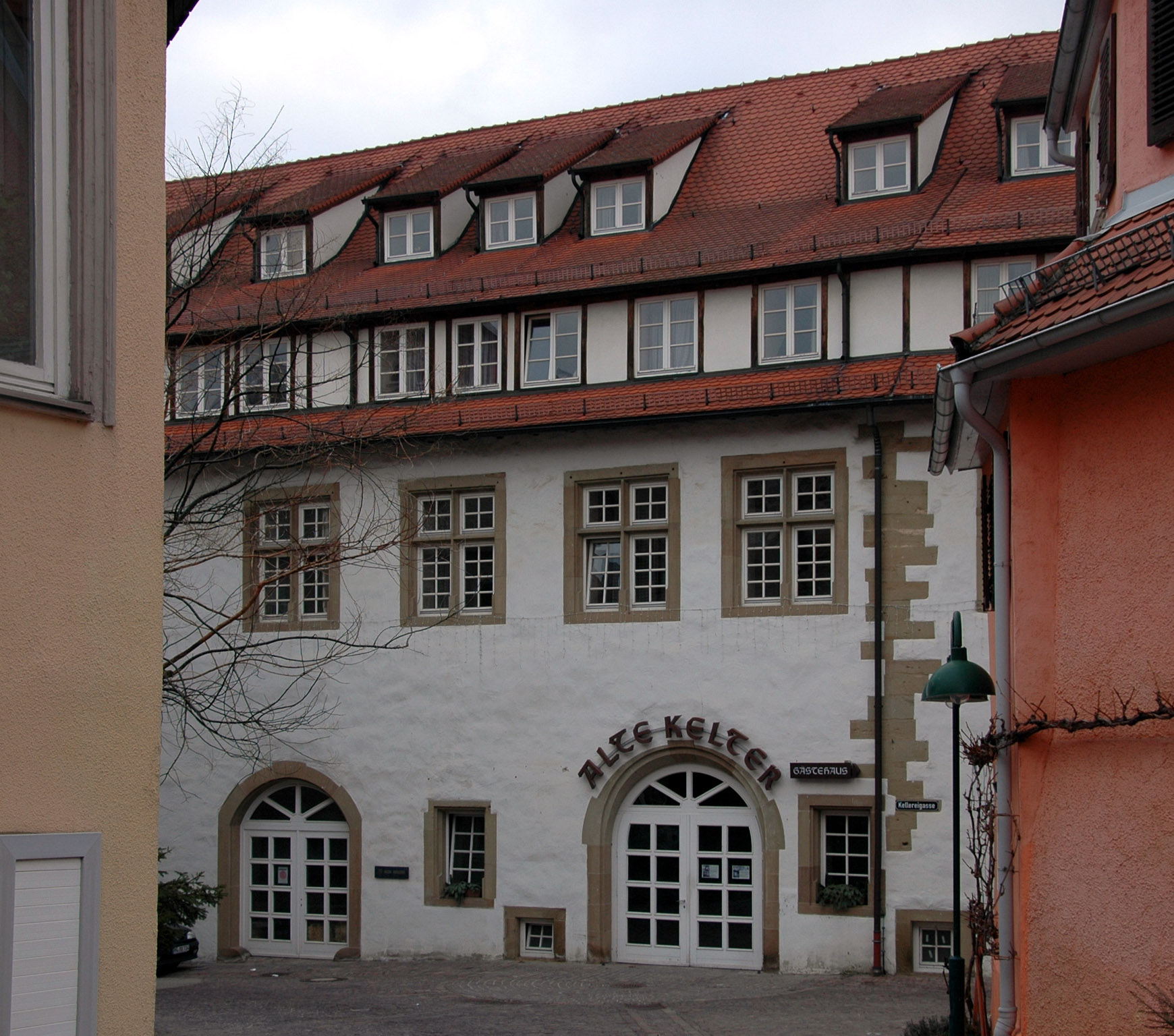 denkmalgeschützte Alte Kelter in Lauffen am Neckar, Ansicht von Süden.